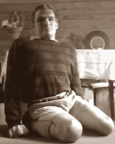 Фотография Максима Сурина, воспитателя детской колонии Куряж близ Харькова.